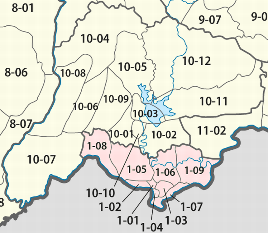 Giấy phép